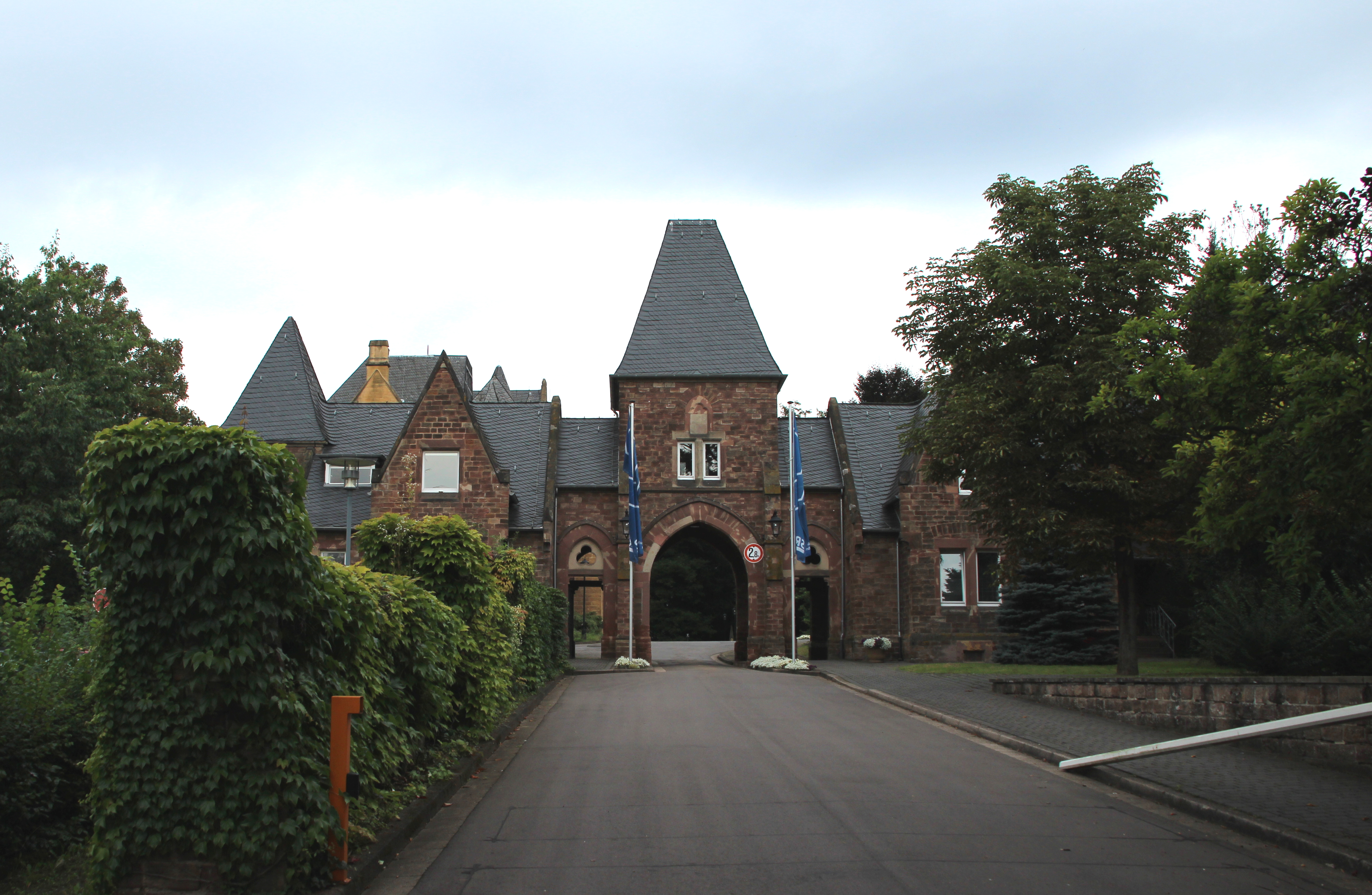 Bildinhalt: Gelände und Gebäude des Saarländischen Rundfunks auf dem Halberg Aufnahmeort: Saarbrücken, Deutschland